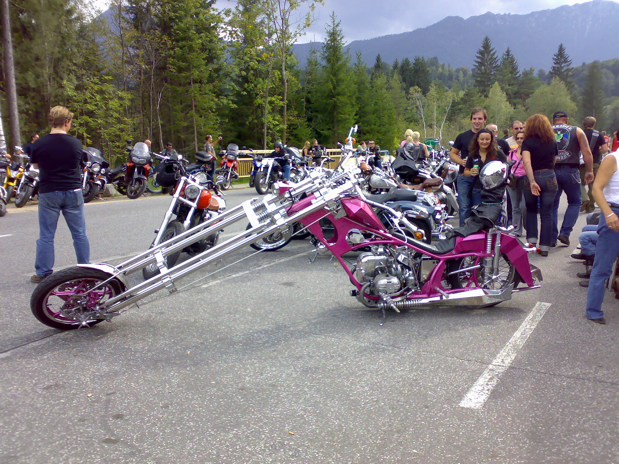 Faak am See bei Finkenstein am Faaker See während Harley-Davidson-treffen September 2008 (dies ist aber kein Harley-Davidson aber ein einzigartiges Model Motorat) / Faak am See near Finkenstein am Faaker See at the Harley-Davidson meeting (this is not a Harley-Davidson but a custom made machine)